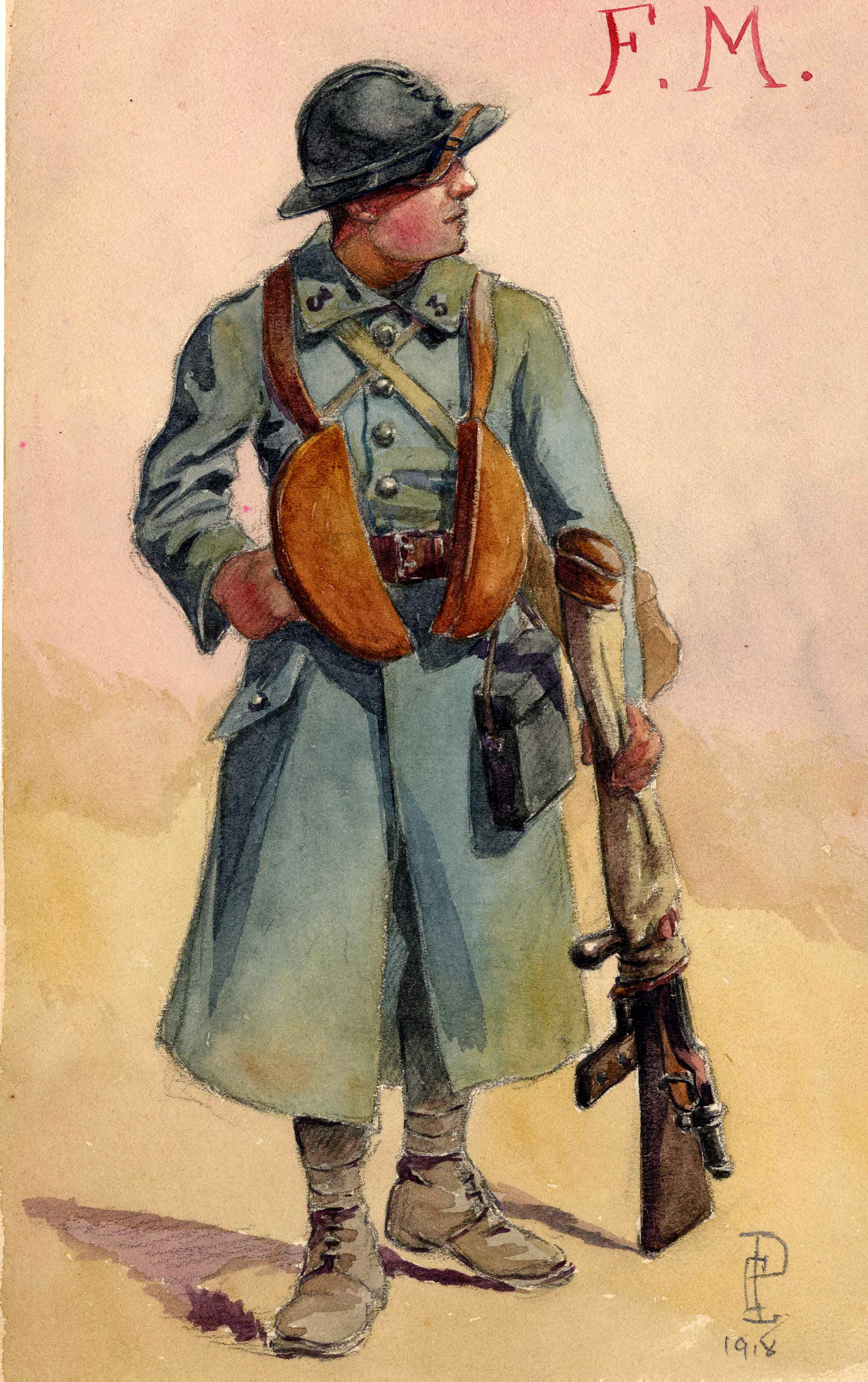 Sodat au repos